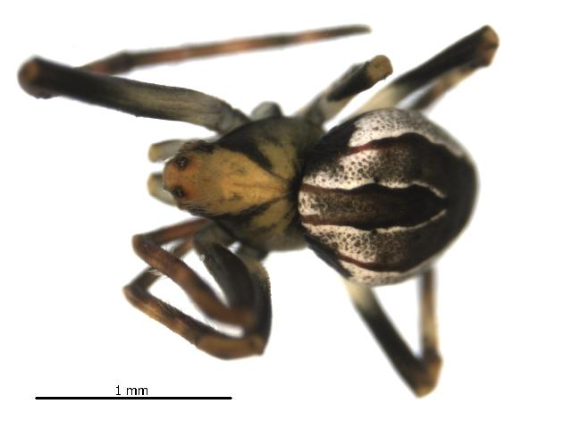 Acacesia hamata